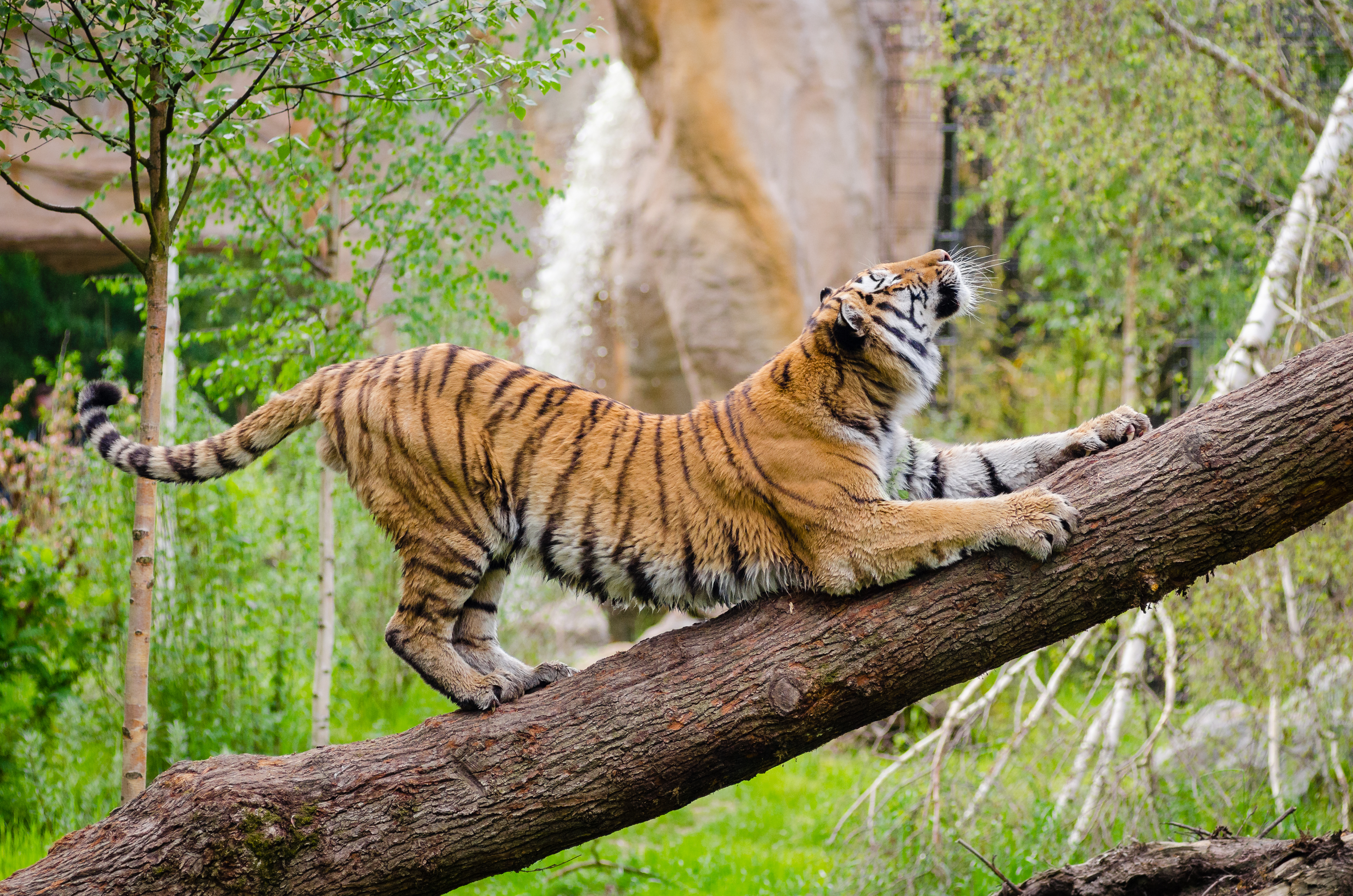 tiger